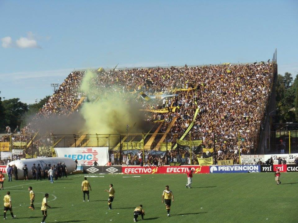 La Mas Fiel